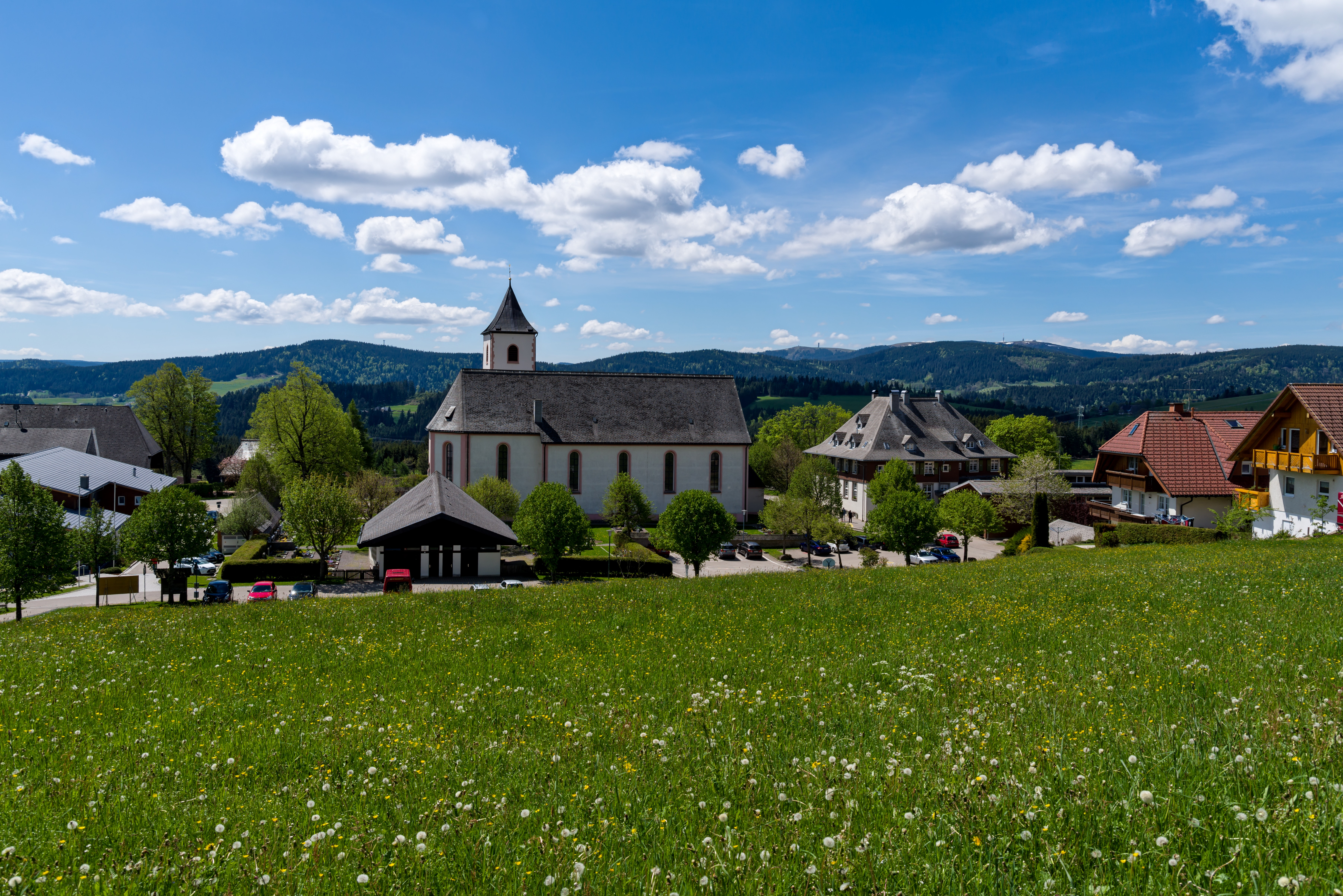 Bilder aus Oberried Aussenansicht